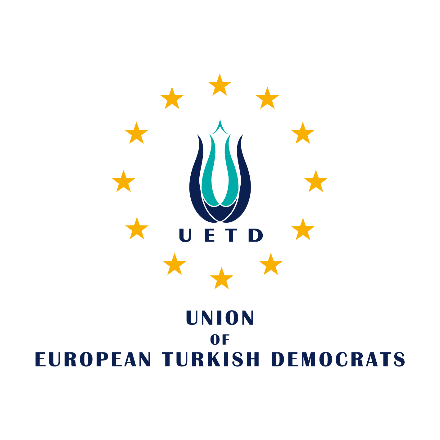 Logo der Union Europäisch-Türkischer Demokraten